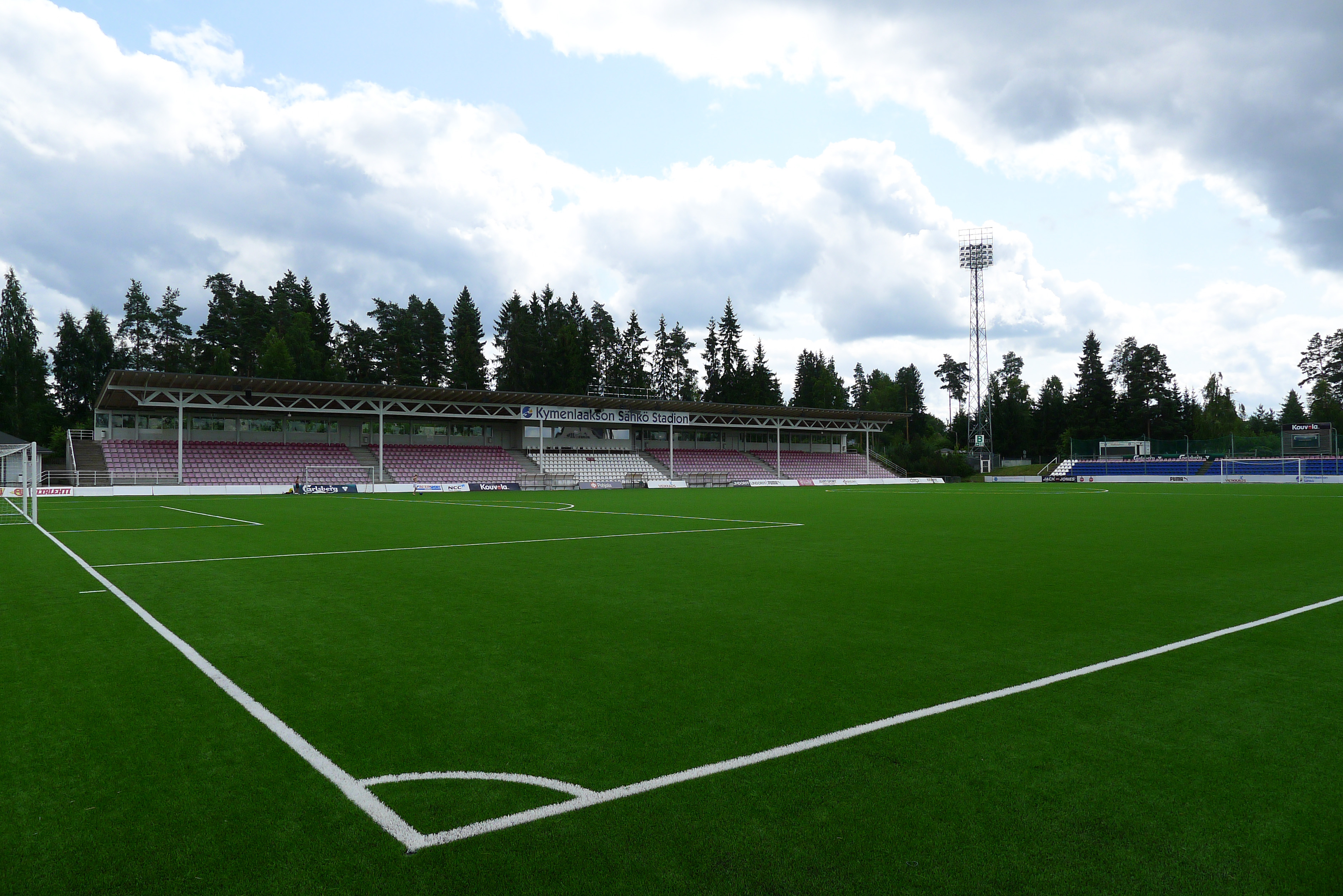 Saviniemen jalkapallostadion 11.7.2013